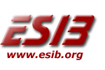 Logo ESIB - The National Unions of Students in Europe